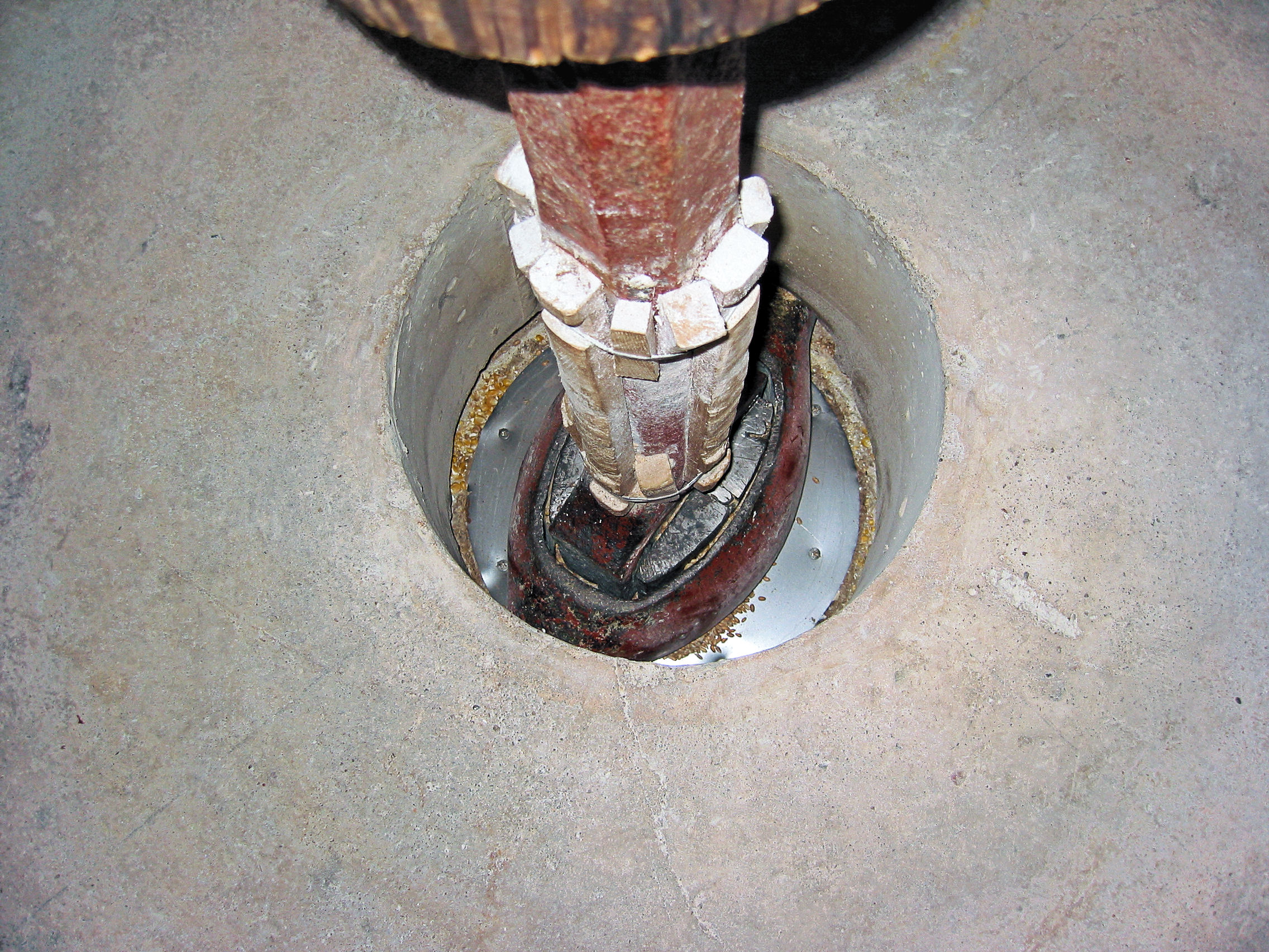 Walderveense molen kropgat